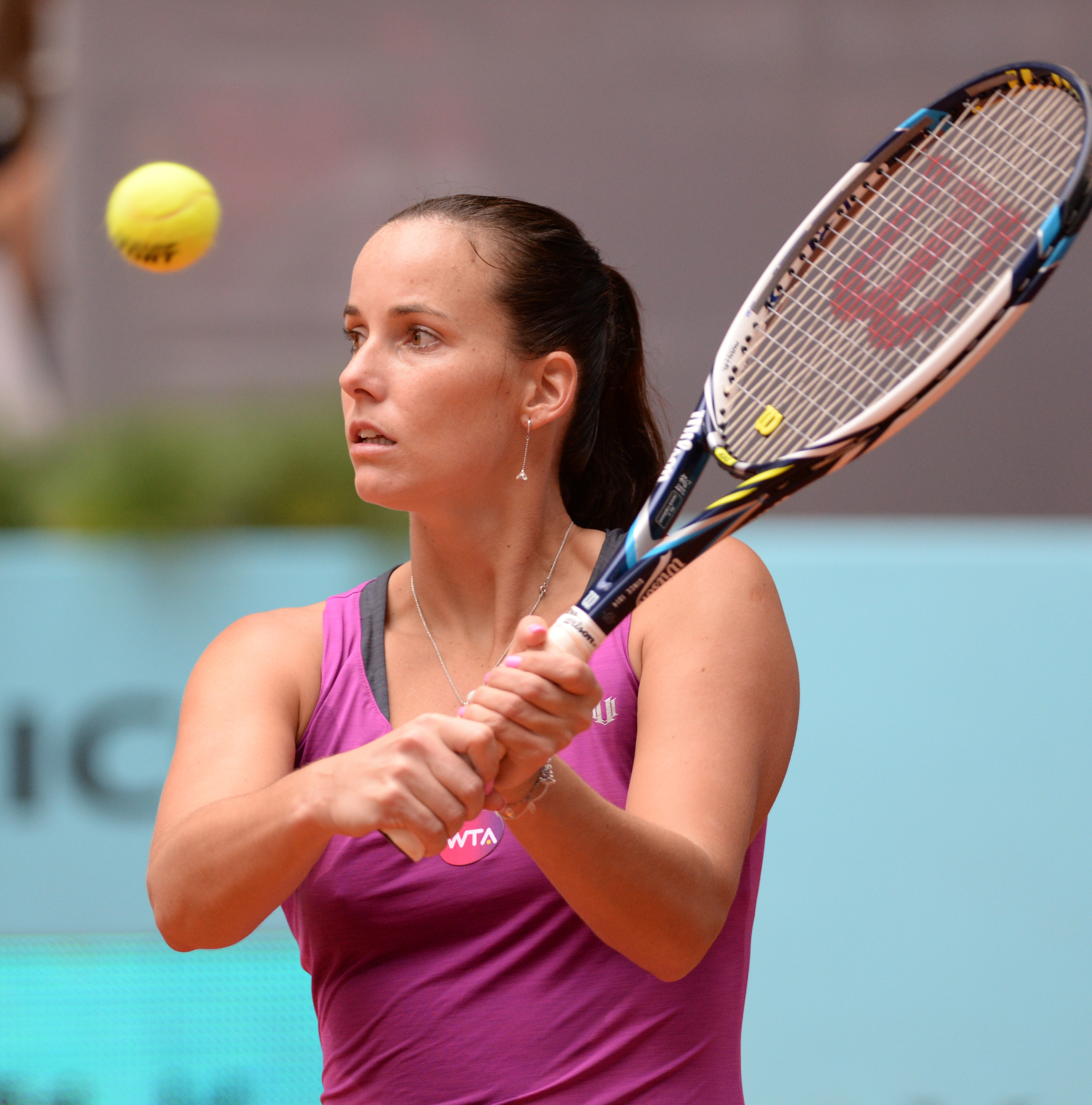 Jarmila Gajdosova